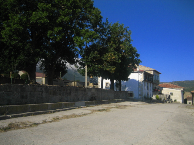 Castrobarto, imagen de la fuente